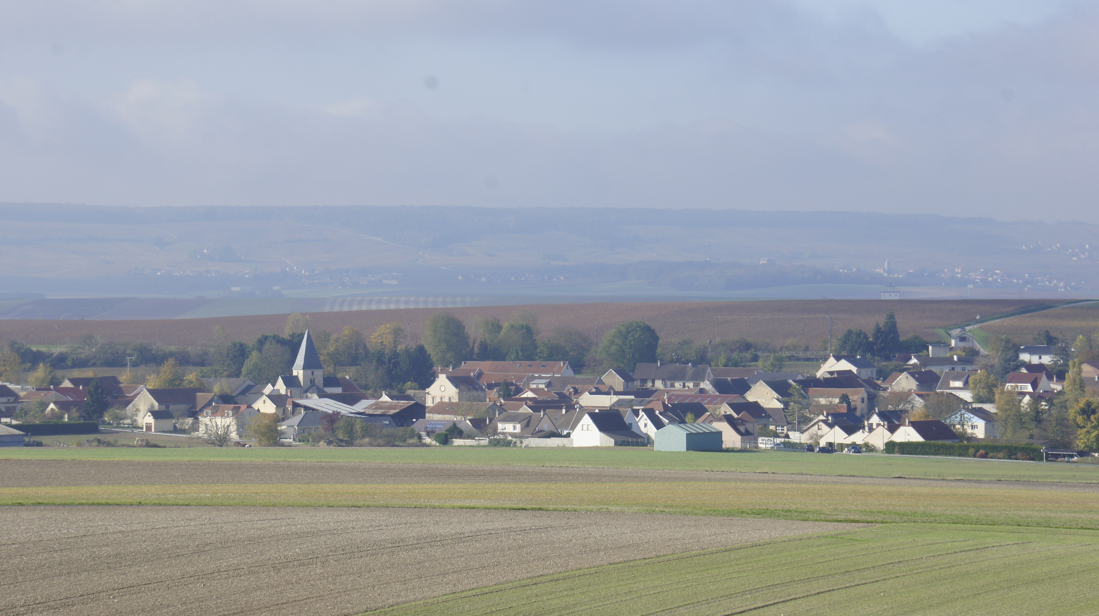 Vue du village depuis la colline.